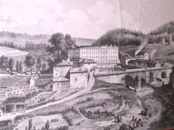 L'abbaye de la Sauve-Bénite au dix-huitième siècle.